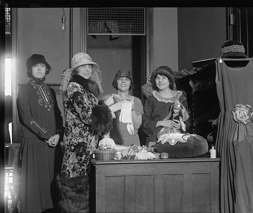 French singer Mistinguett (1875-1956)